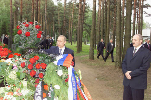 МИНСК. Возложение цветов к могиле известного актера Николая Еременко. С Президентом Белоруссии Александром Лукашенко.